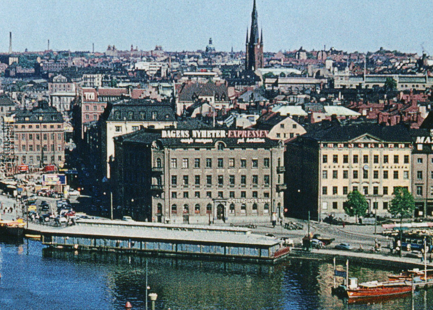 Kornhamnstorg 4 (t.h.) och 6